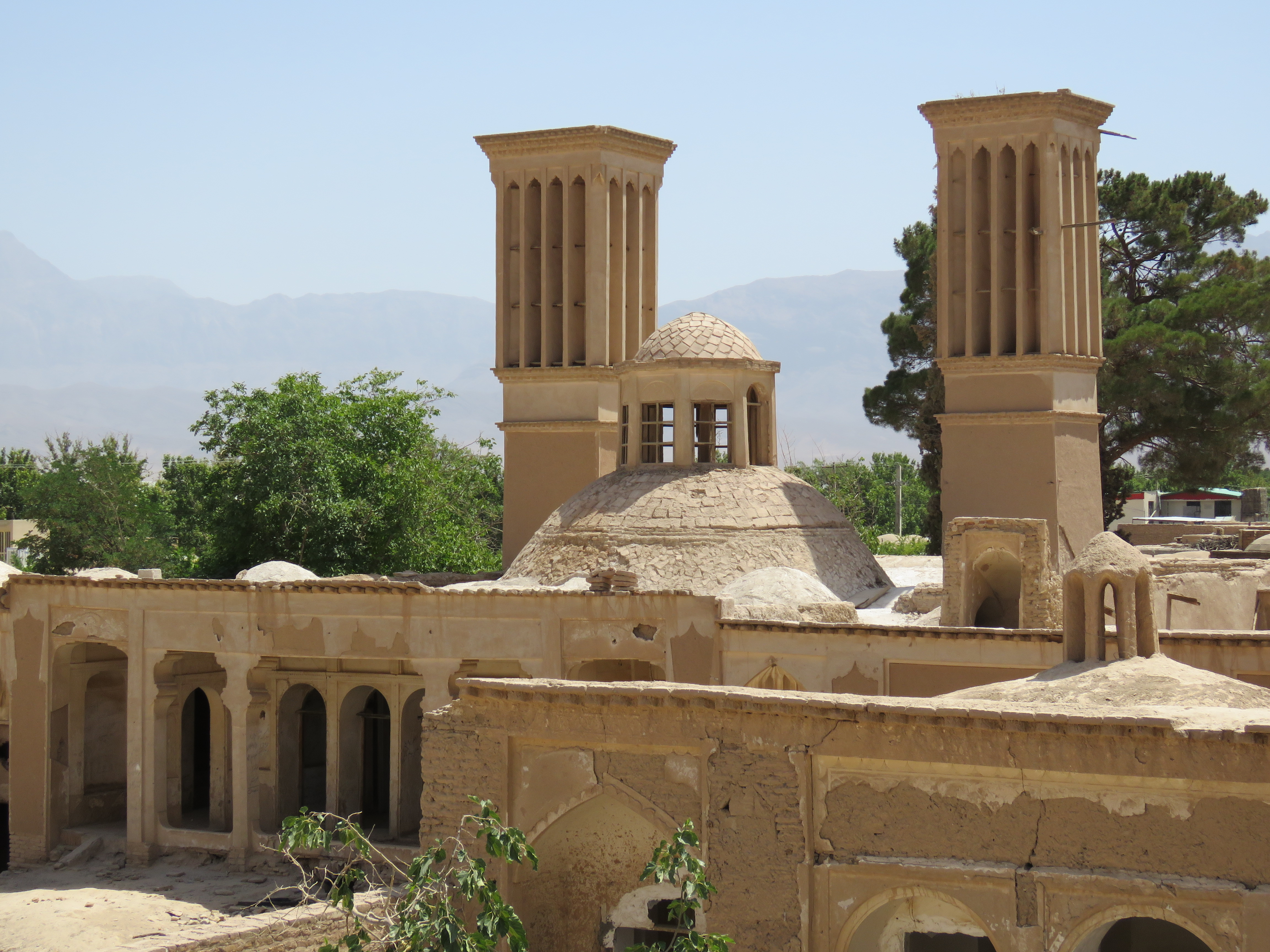 شترگلو